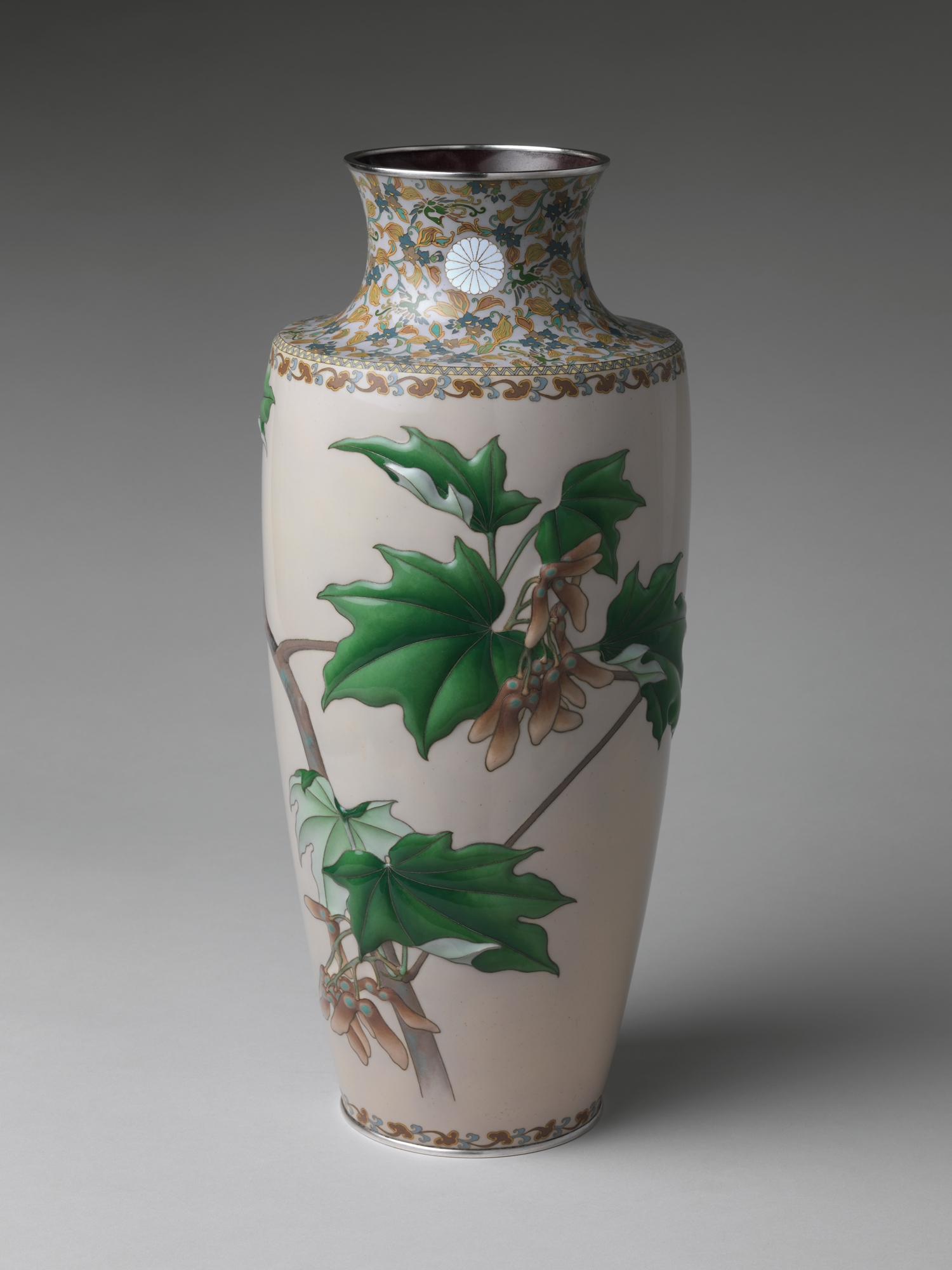 Japan; Vase; Cloisonné